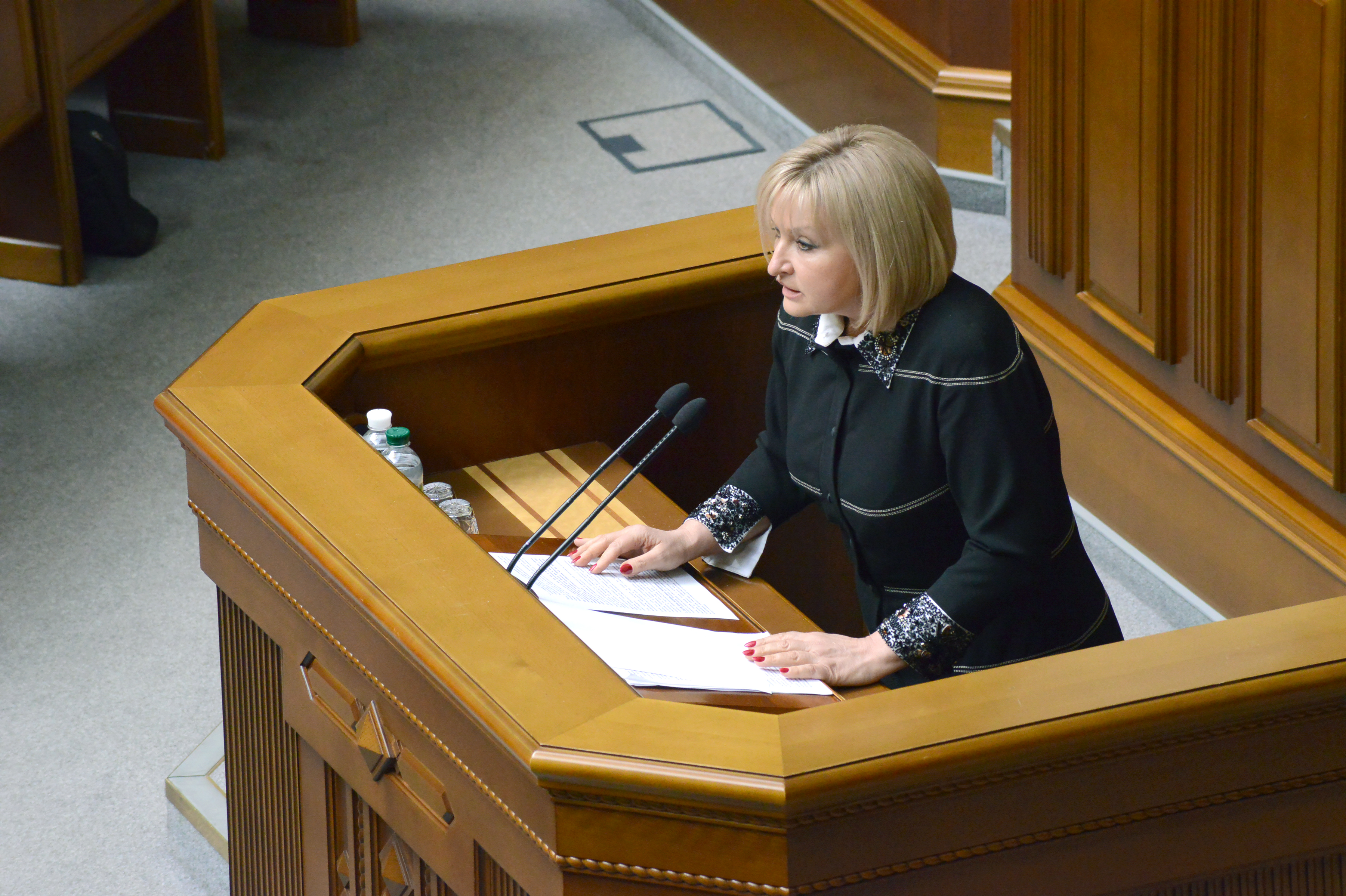 ВЕРХОВНА РАДА УКРАЇНИ 2015 фотограф Вадим Чуприна